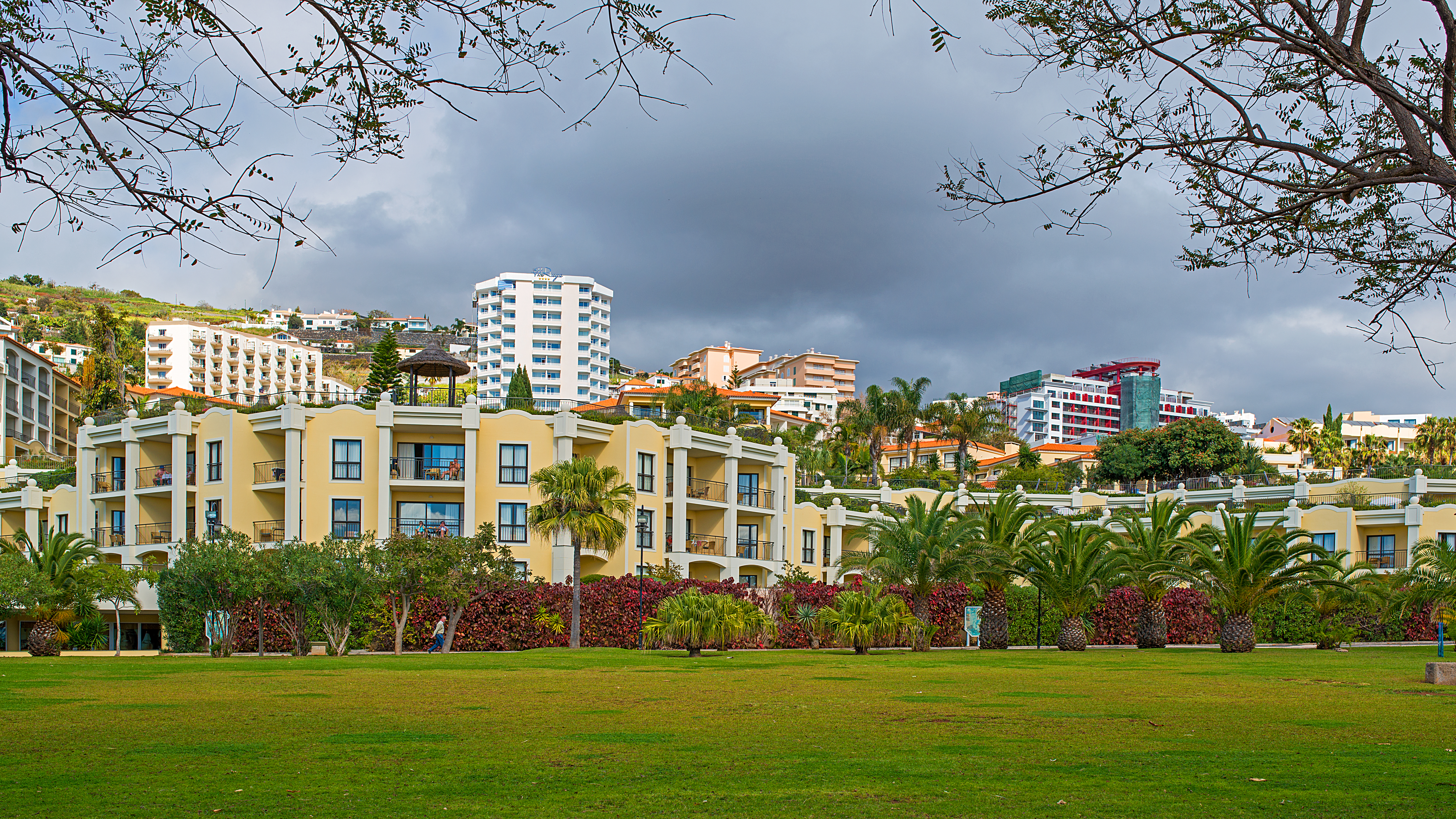 Funchal Madeira Portugal January 2014